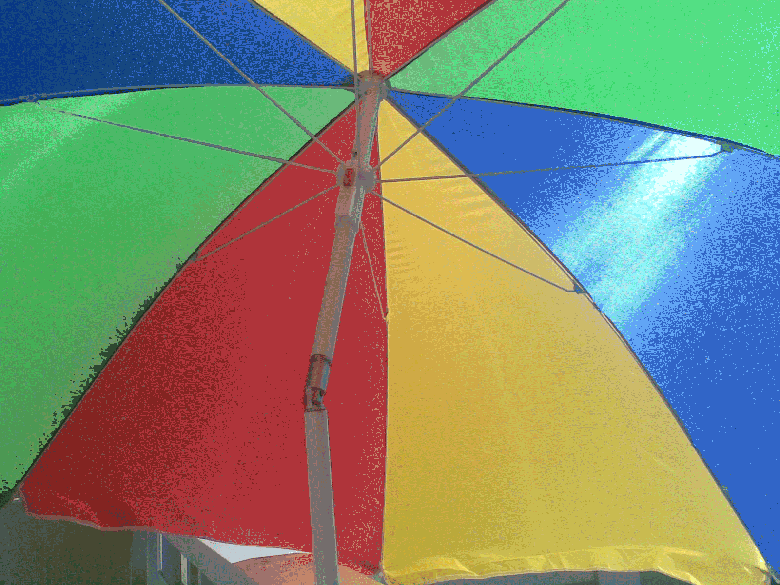 Ein Sonnenschirm mit den vier Grundfarben rot-grün und blau-gelb, der in einem zweiten Bild in die unbunten Farben - also nur noch variiert in helle und dunkelere Flächen auf Commons liegt: File:Sonnenschirm-unbunt.png